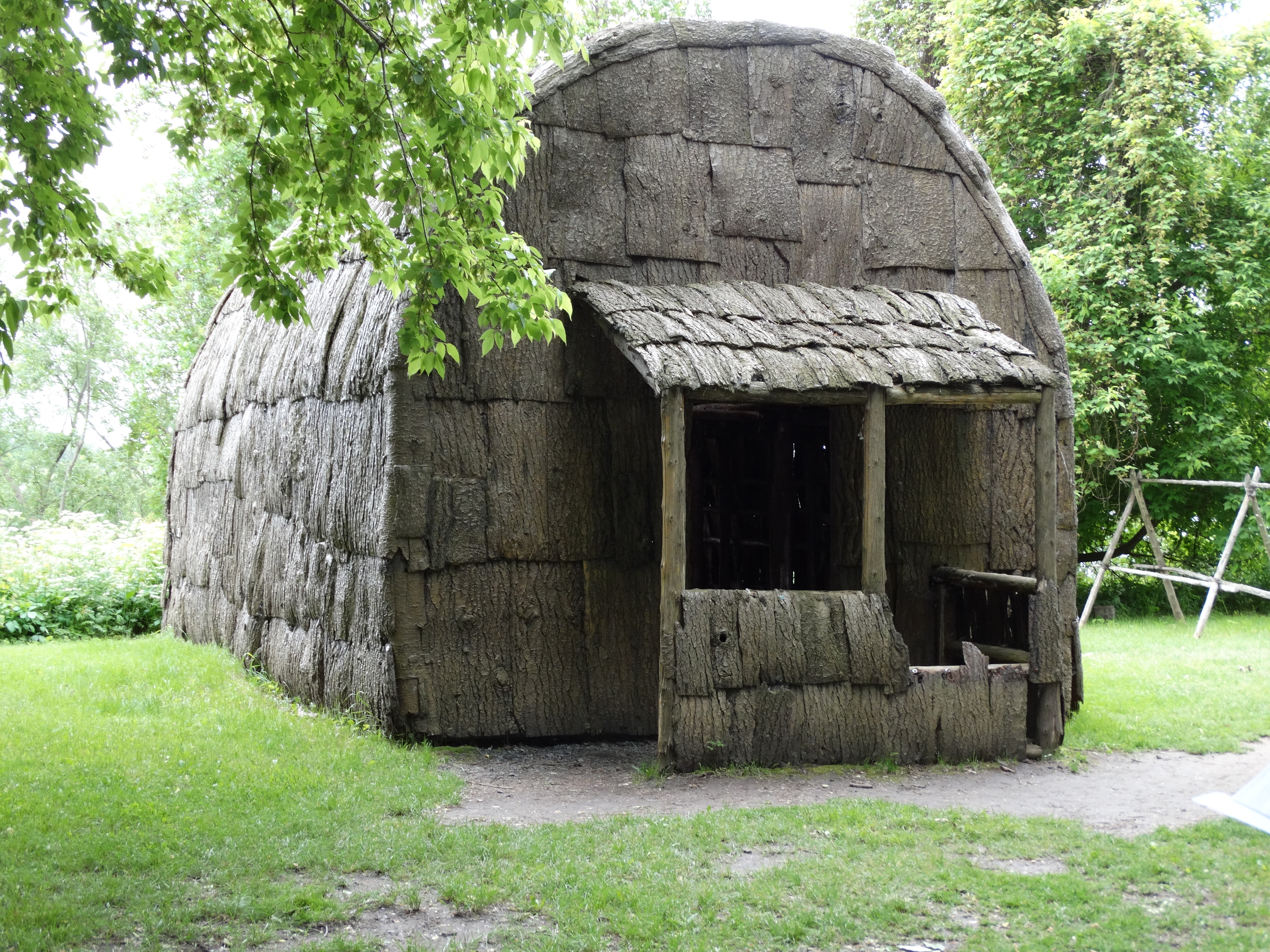 Maison longue au site archéoligique des Îles-de-boucherville